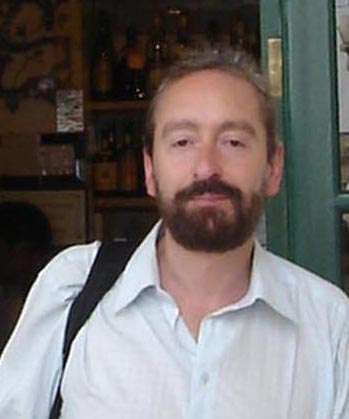 Foto del poeta y narrador Gonzalo Márquez Cristo